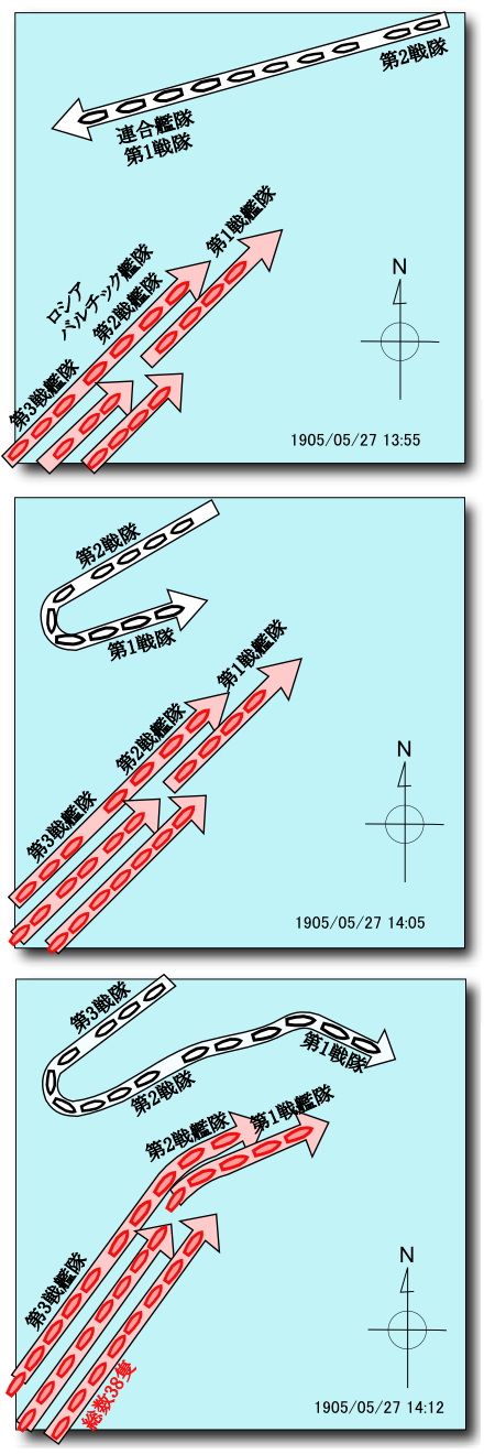 日本海海戦 位置1-3 日本語